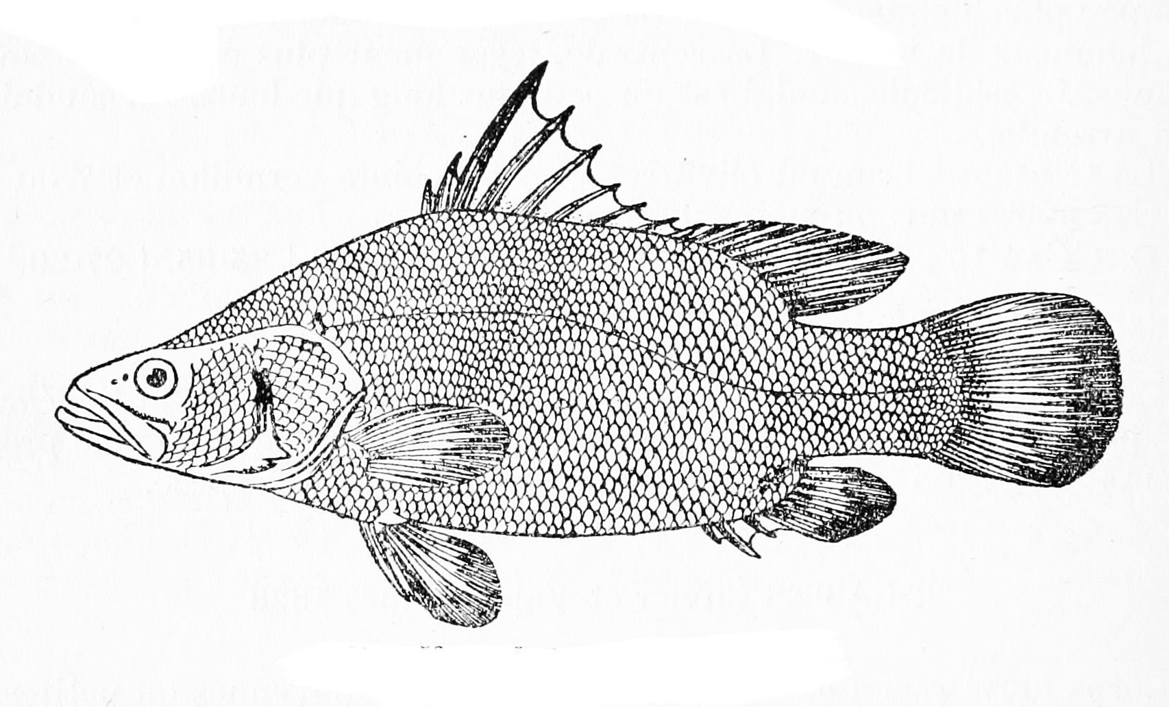 Lates niloticus